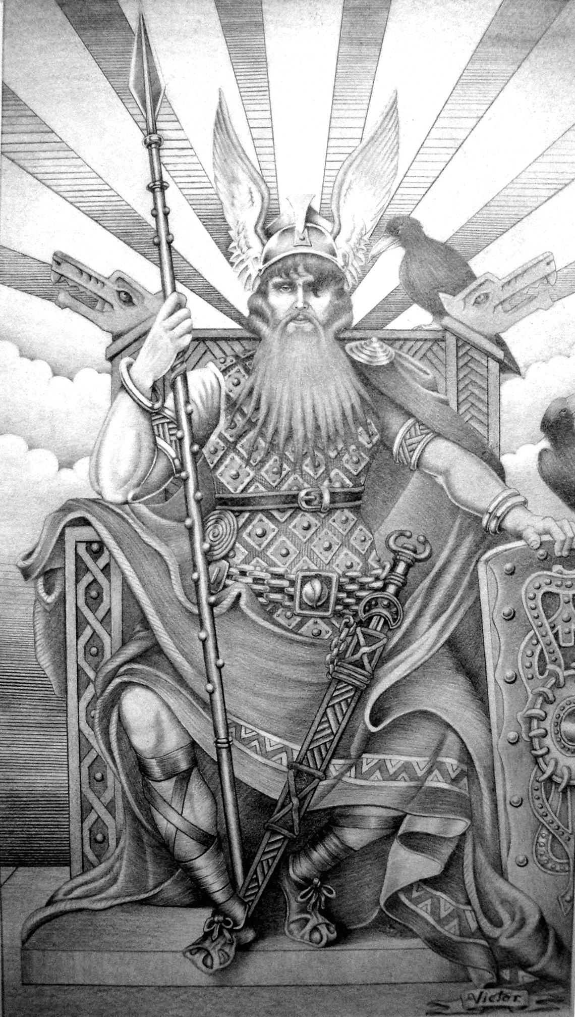 Odin dios de la guerra según la mitología Escandinava